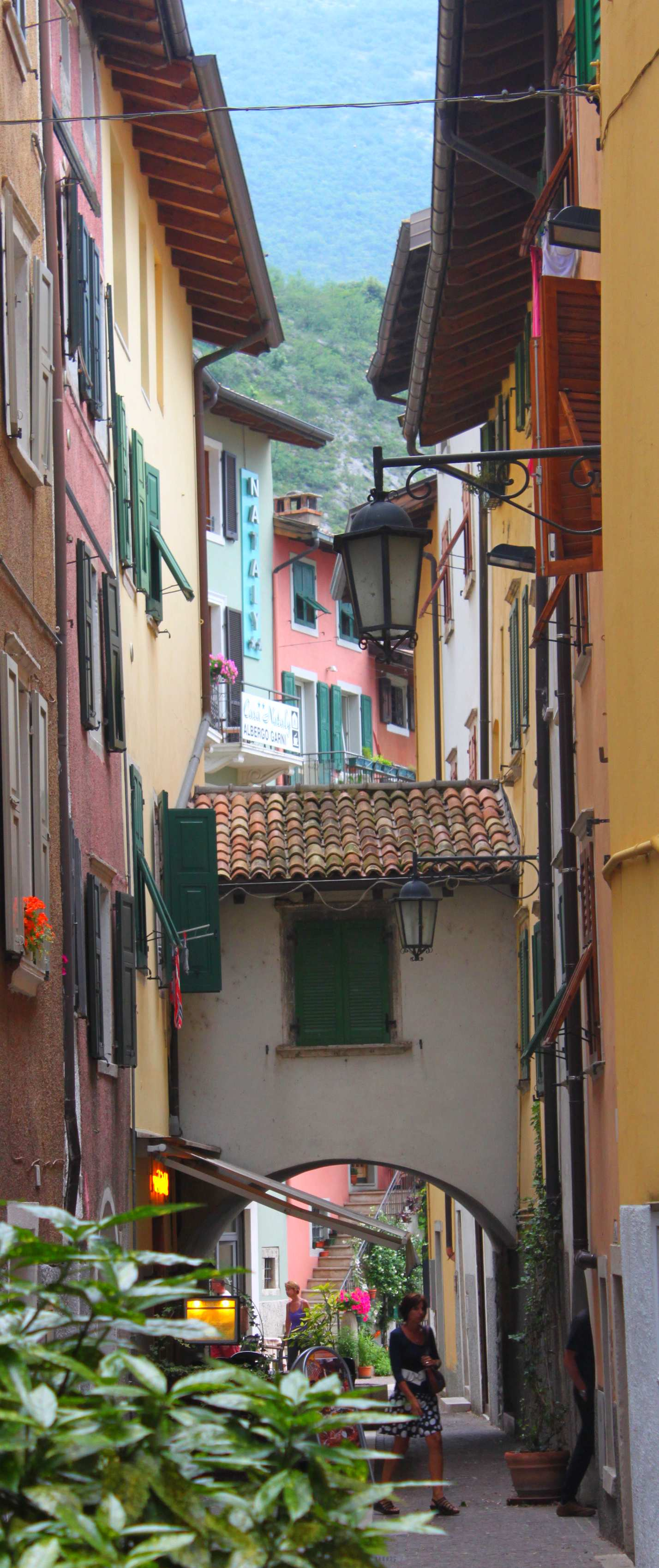 Enge Gasse in Torbole